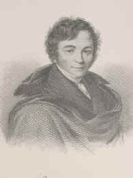 Theodor Hell (1775-1856), deutscher Schriftsteller. Stahlstich von Weger, ca. 1850